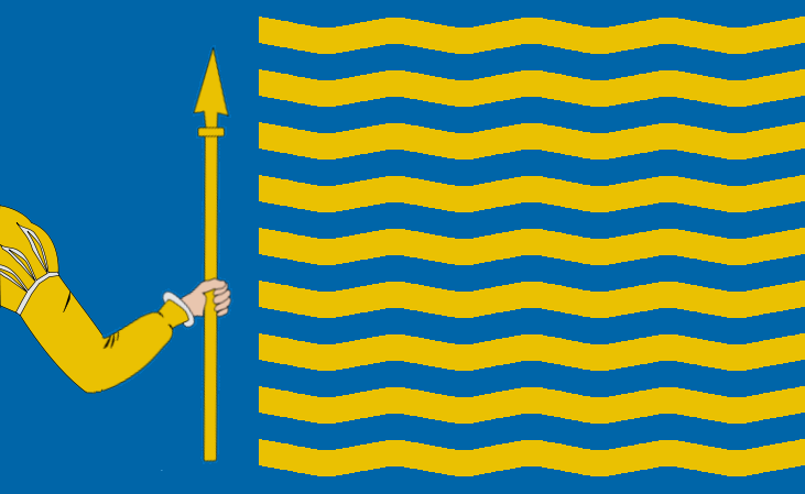 Bandera del concello de Sanxenxo.